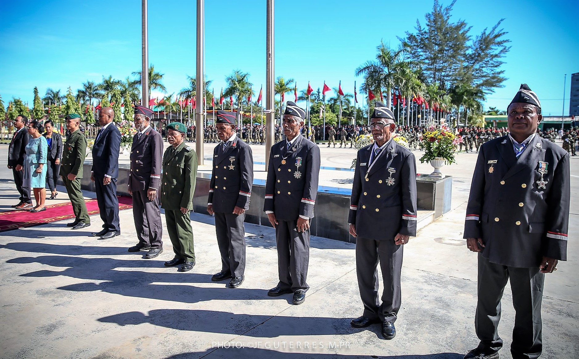 Verleihung des Ordem de Timor-Leste an Veteranen und Hinterbliebene